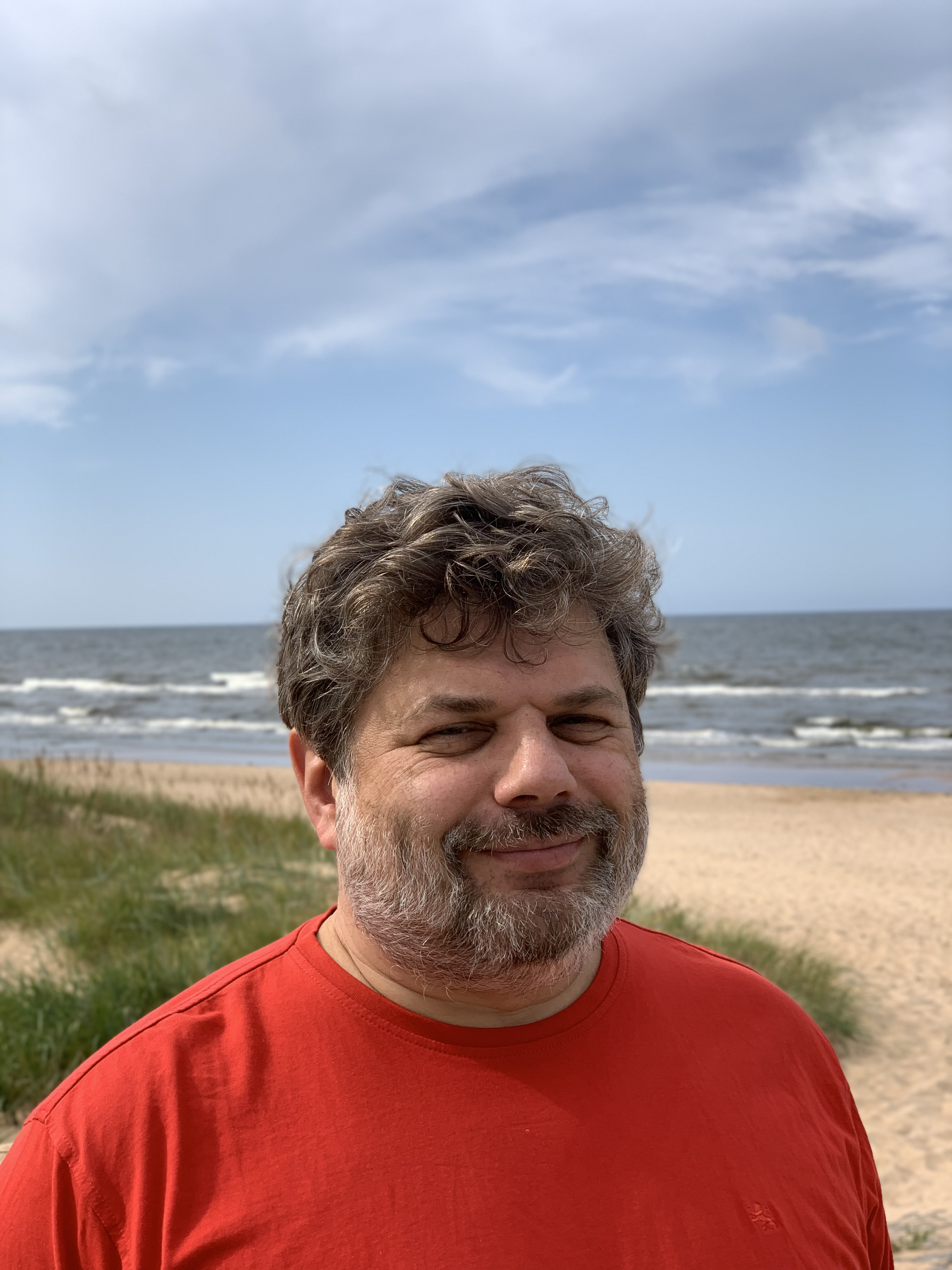 Художественный руководитель Русского Театра Эстонии.